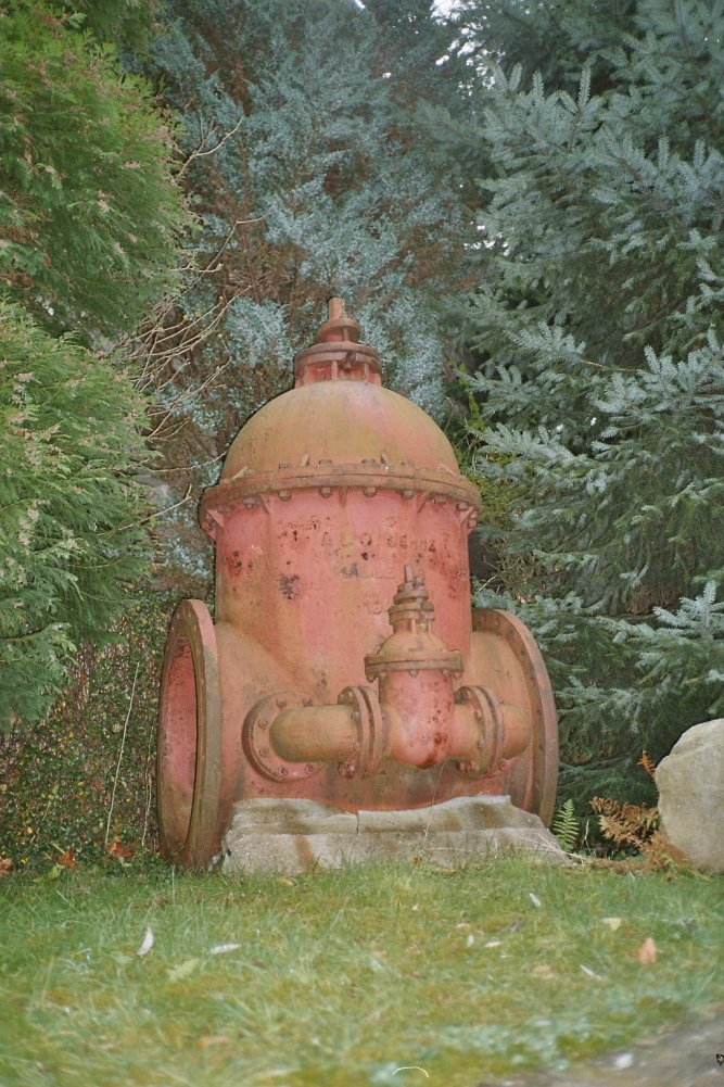 Ein Absperrschieber